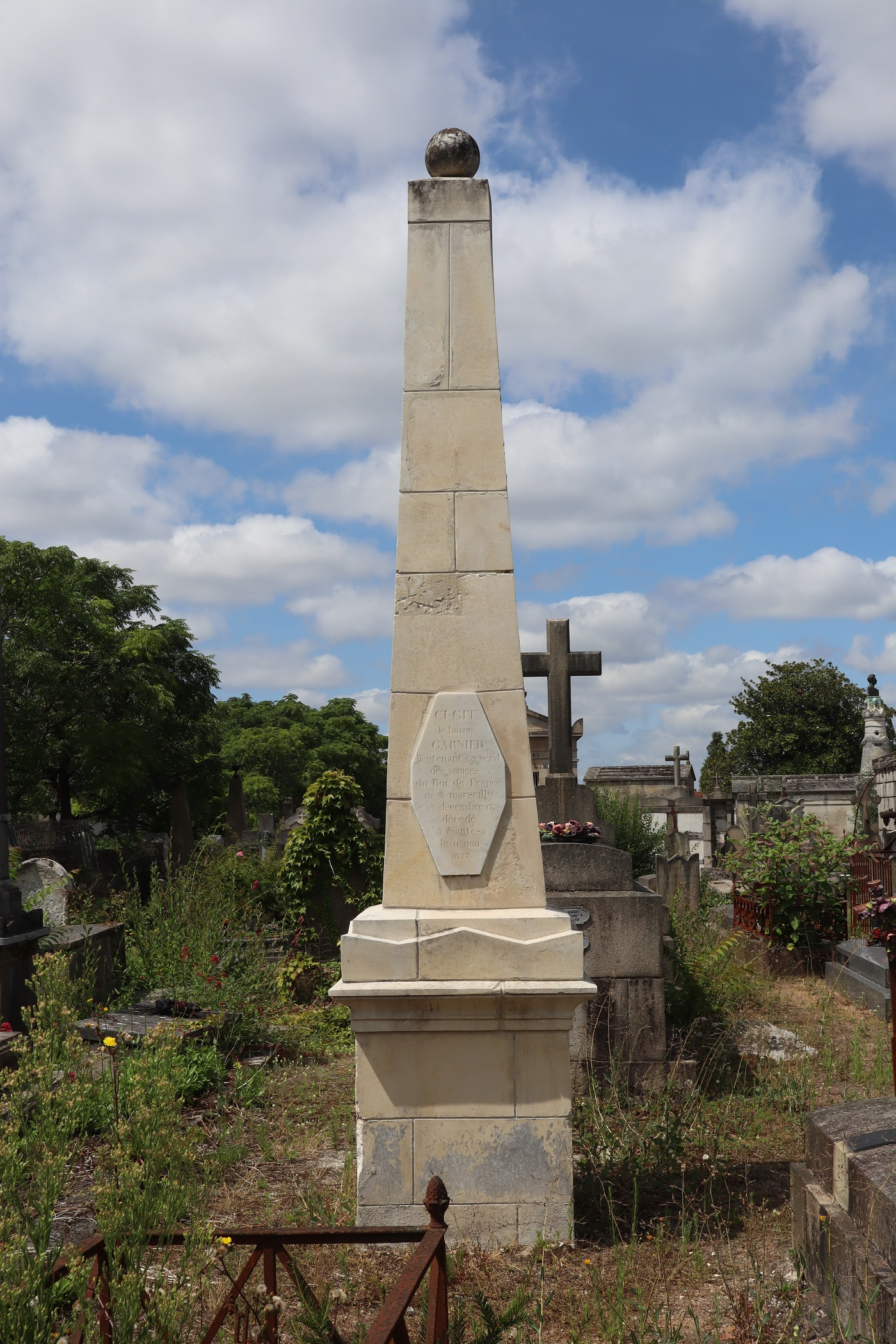 Tombe de Pierre Dominique Garnier (Marseille 1756 - Nantes 1827), au Cimetière Miséricorde de Nantes (44).